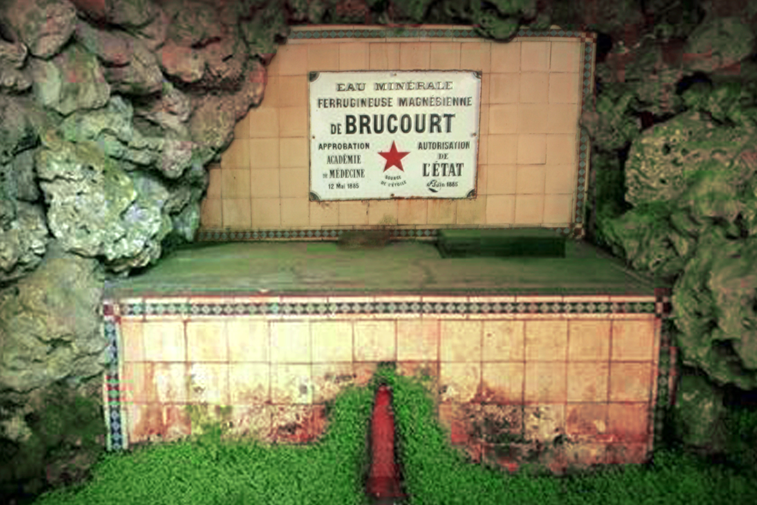 source de l'Etoile